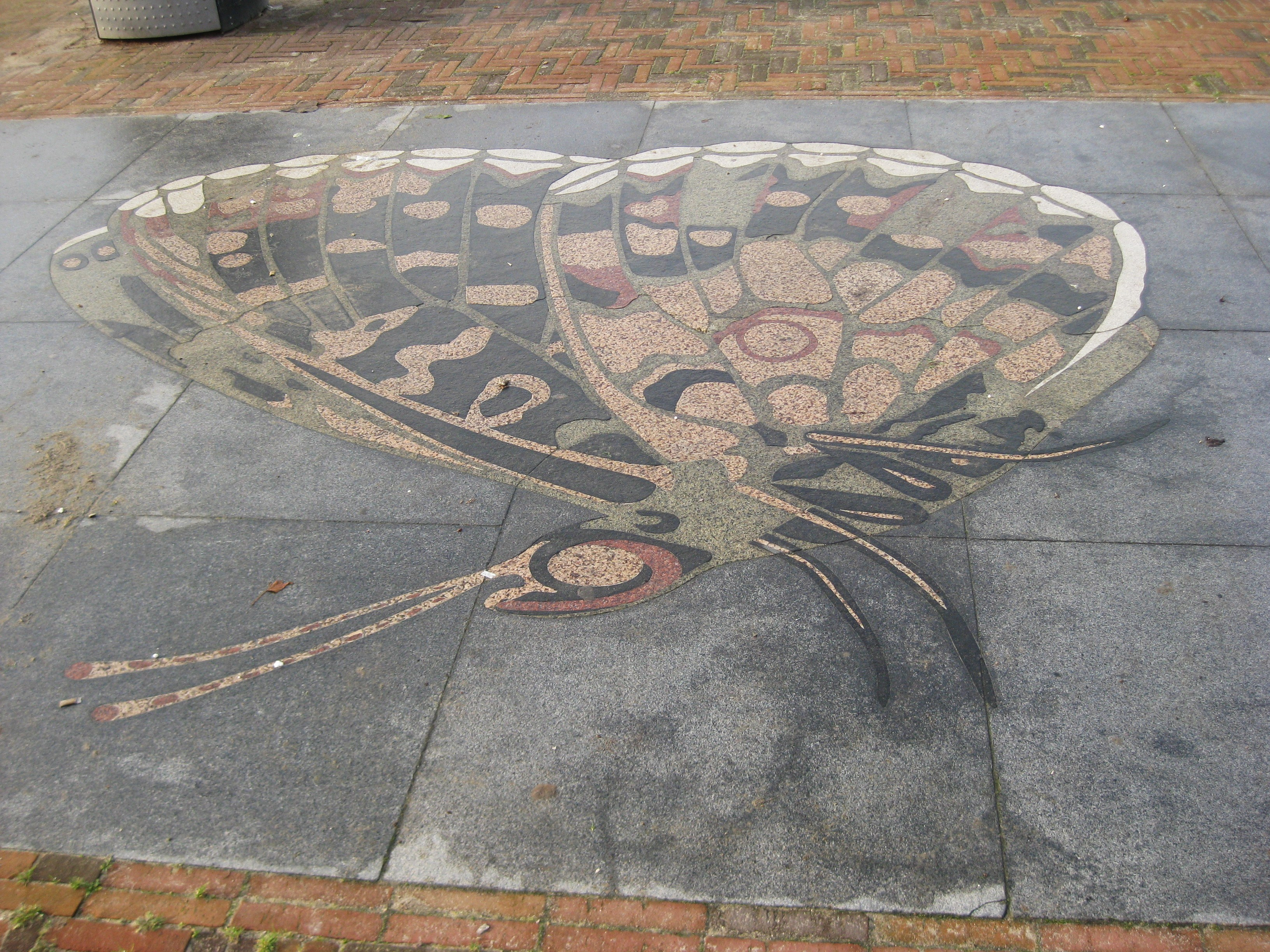 "Zilveren manen" van Berend Strik 2008/2013 natuursteen en verschillende soorten graniet. Waterlandplein, Amsterdam-Noord